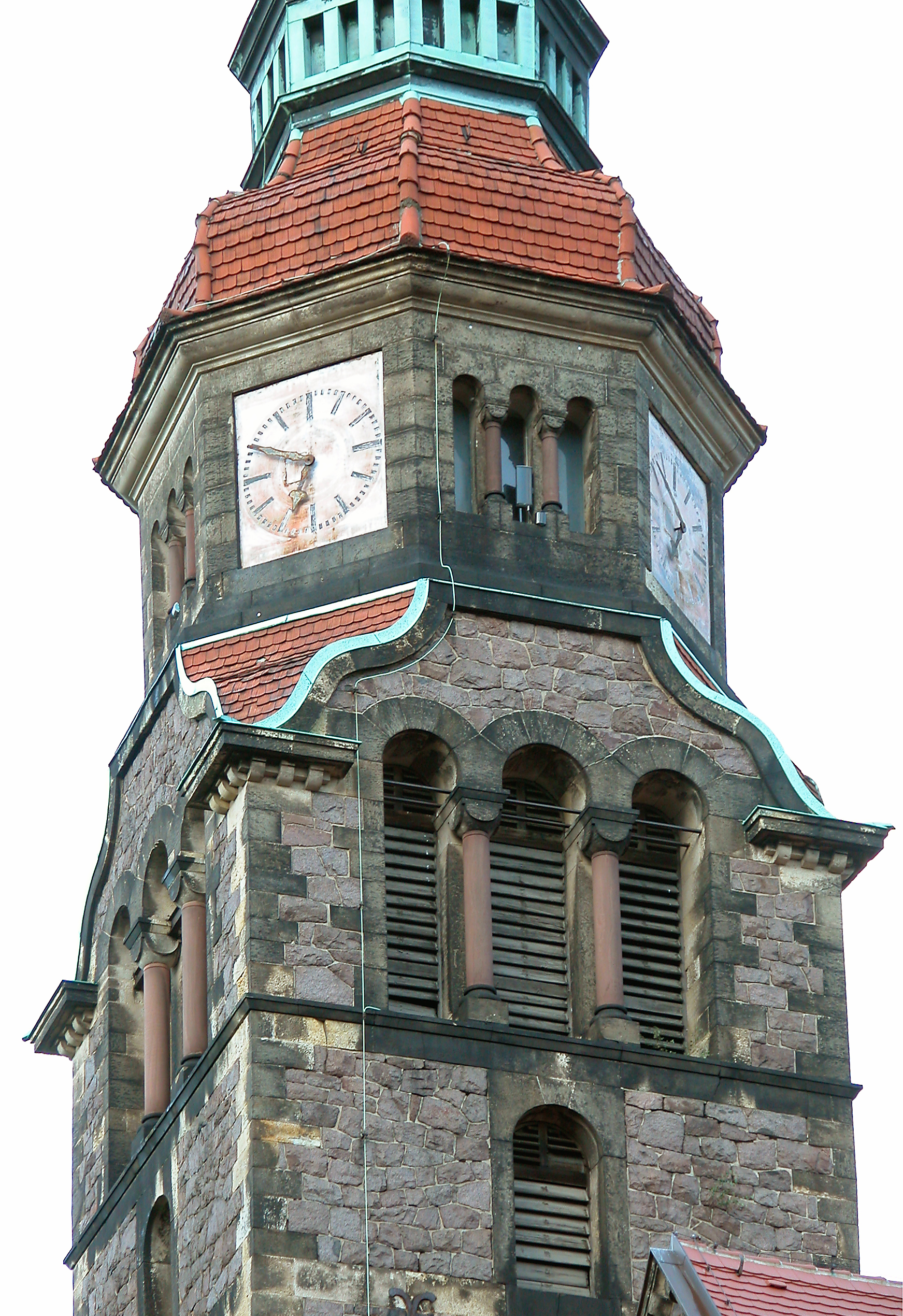 05.09.2007 01705 Freital-Hainsberg, Kirchstraße 10 / Ecke Hainsberger Straße (GMP: 50.980621,13.633523): Hoffnungskirche Freital bzw. Hainsberger Kirche, erbaut 1900 - 1901 aus Bruchsteinmauerwerk mit Sandsteingewänden im Stile der Neoromanik. Sicht von Südwesten. [DSCN29334.TIF]20070905065DR.JPG(c)Blobelt